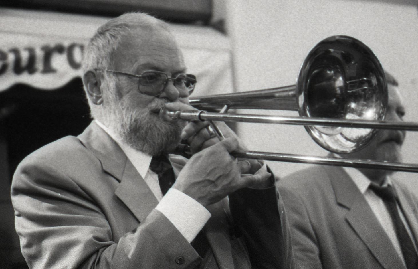 Papa Bue mit seiner Viking Jazzband im Konzert in Braunschweig am 07.07.1992 in der Burgpassage